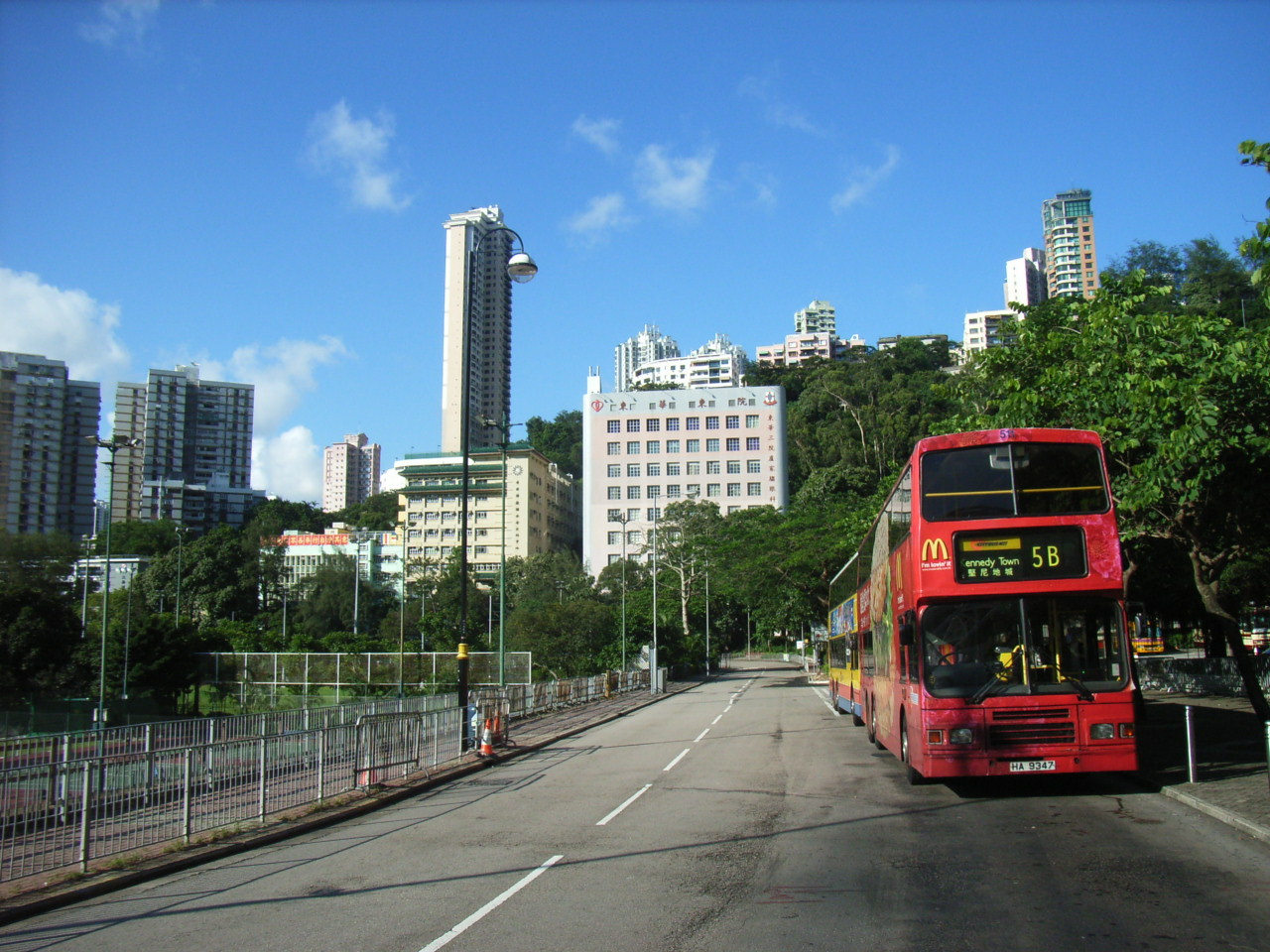 東院道（Eastern Hospital Road），是香港島銅鑼灣南部掃桿埔的一條街道 Author: BEVERLYSHEN